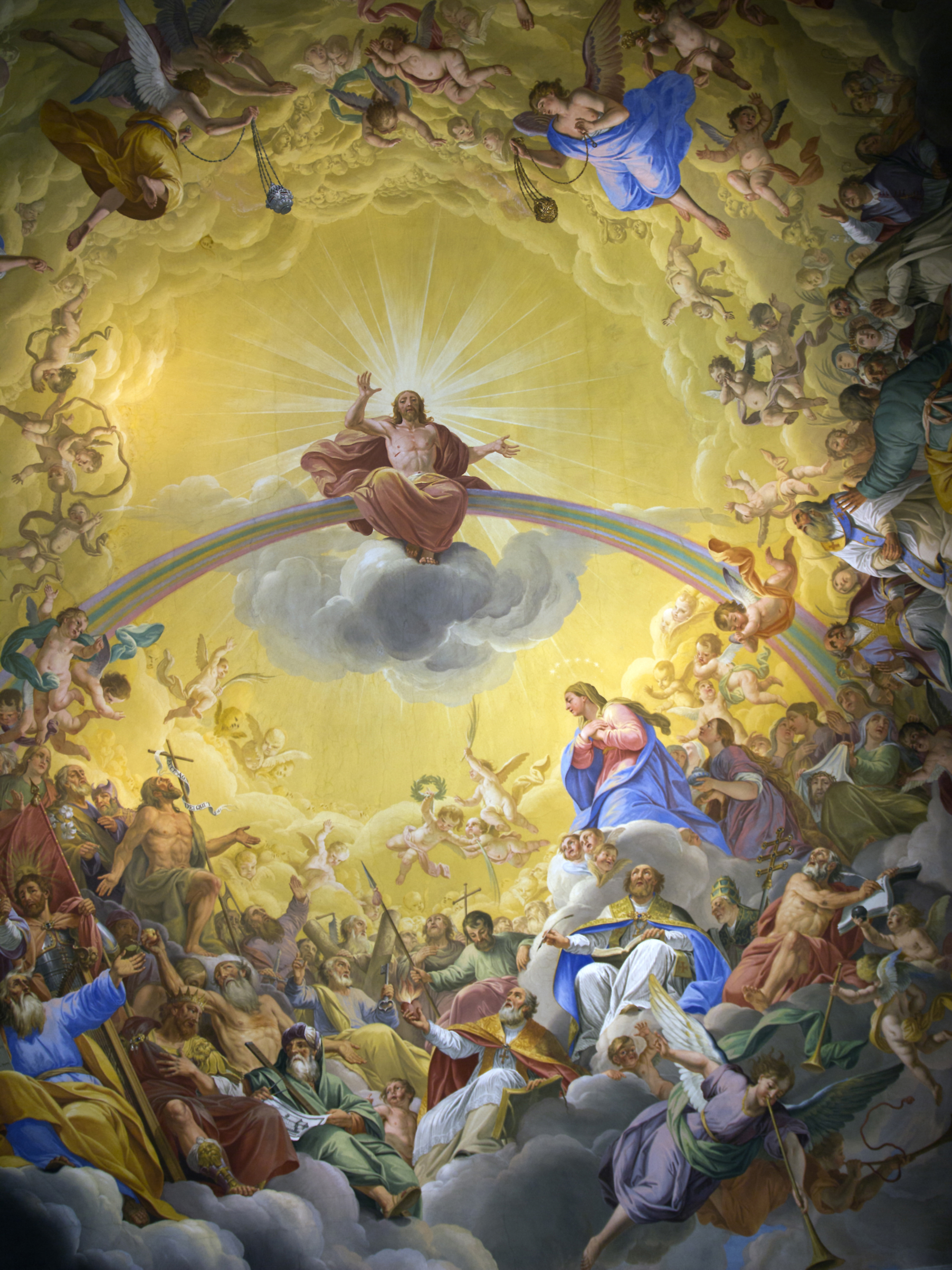 Stift Vorau Dieses Bild wurde anlässlich des österreichischen Tags des Denkmals 2013 in der Steiermark eingereicht.